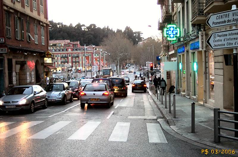 Nice-Arrivée du boulevard Carnot sur le port en provenance de Villefranche. Photo au crépuscule.